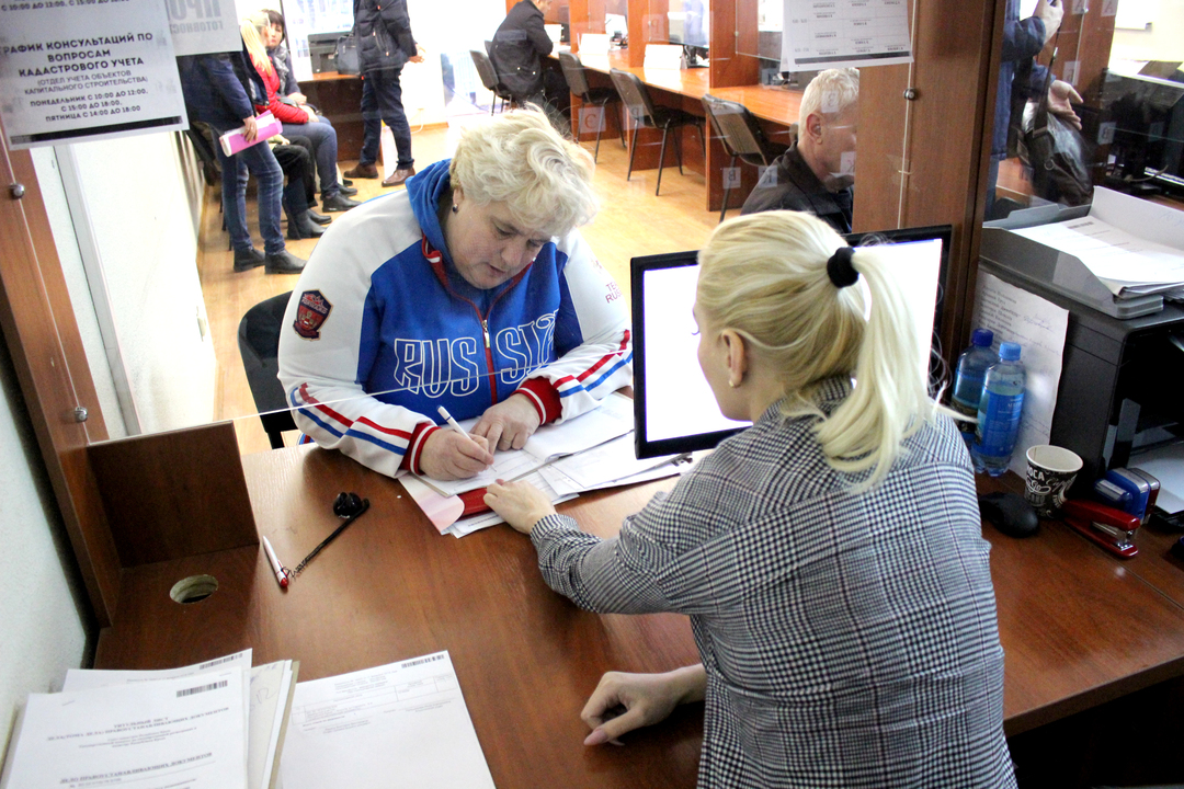 Собственное жилье мастер спорта международного класса Татьяна Якибчук получила при содействии Главы Республики Крым Сергея Аксёнова